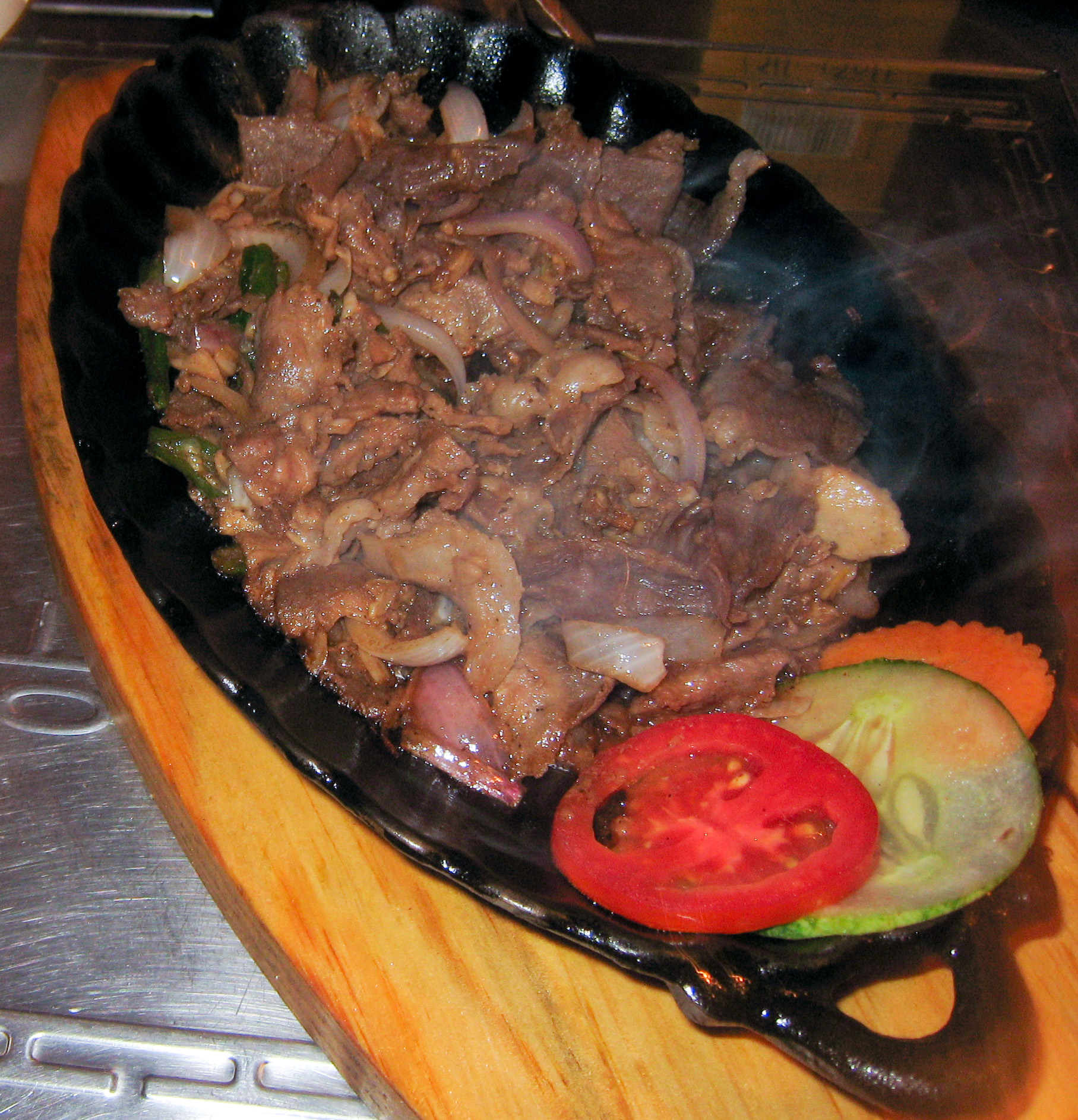 Bulgogi, Korean barbecued dish